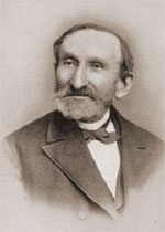 Georg Ferdinand Howaldt(* 8. April 1802 in Braunschweig; † 19. Januar 1883 in Braunschweig) war ein bekannter Goldschmied, Bildhauer und Erzgießer.